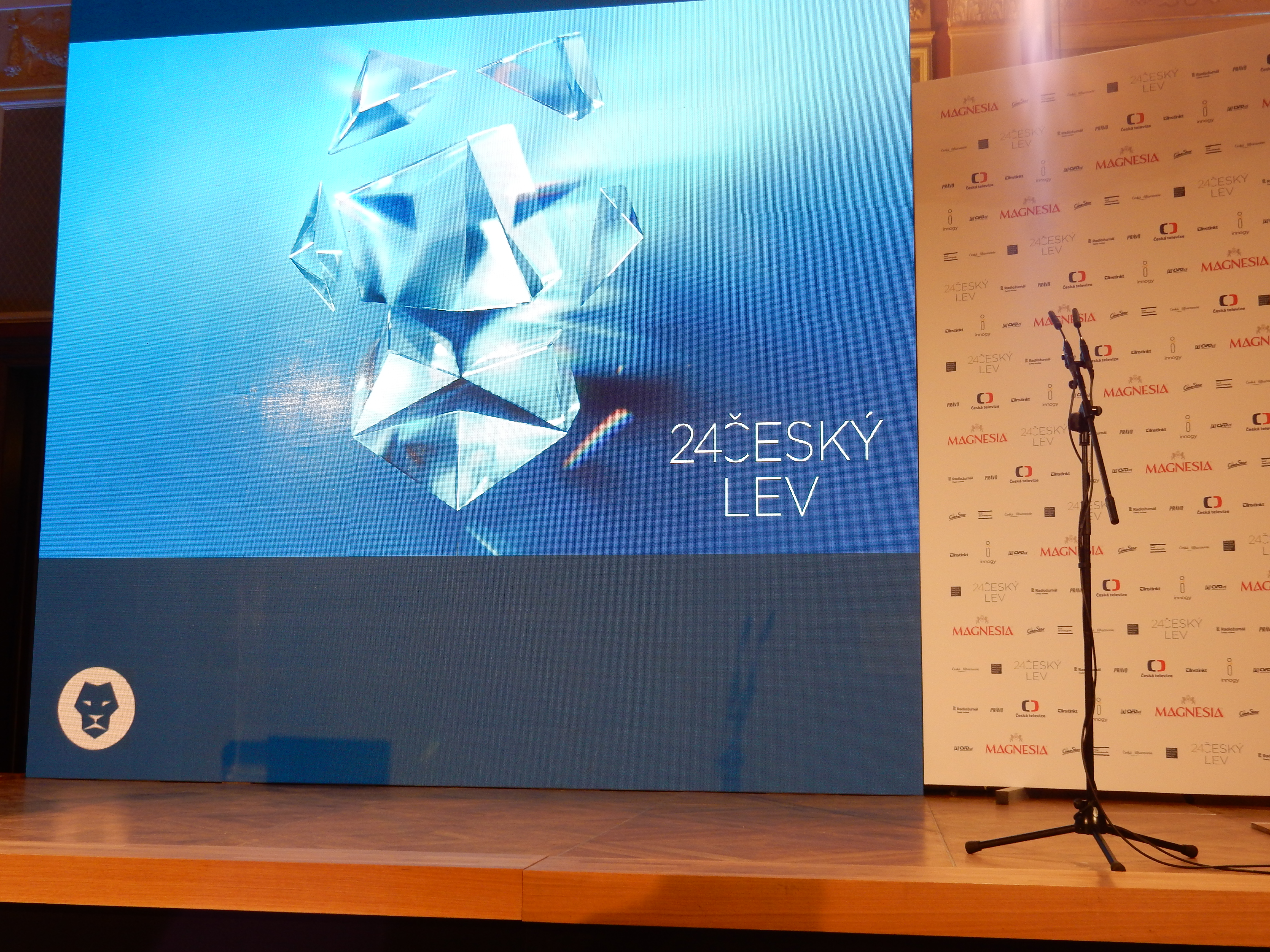 Fotka z novinářské konference 18.1.2017. Autor: Blanka Borová (Karolína Černá) pro Kritiky.cz